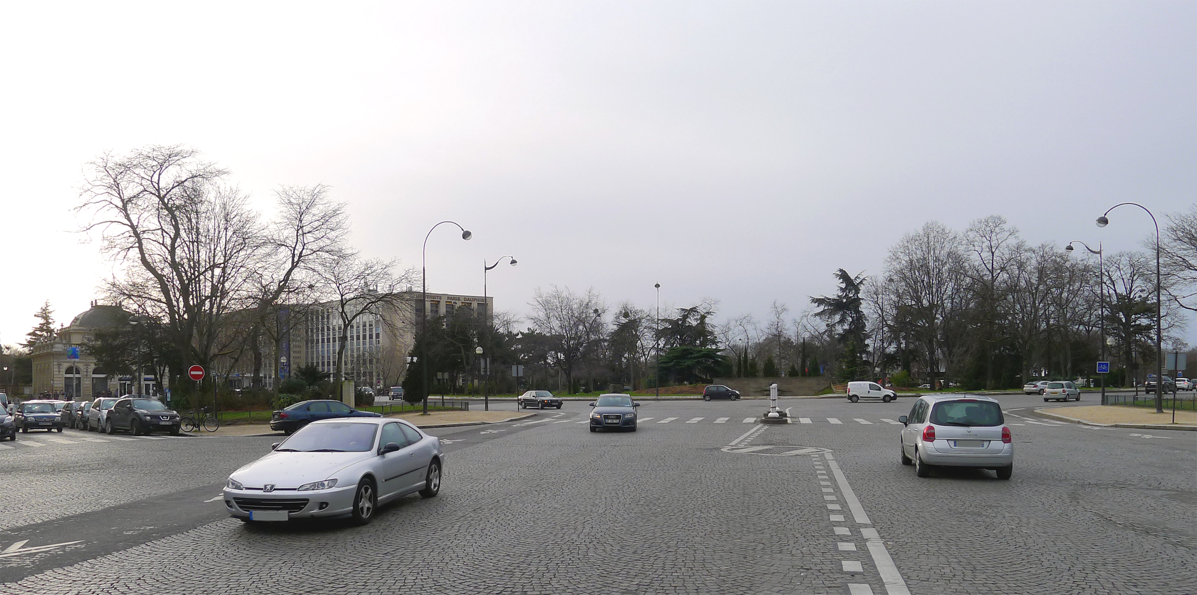 Place du Maréchal-de-Lattre-de-Tassigny - Paris XVI